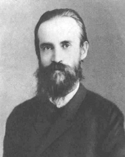 Русский философ-спиритуалист Лев Михайлович Лопатин